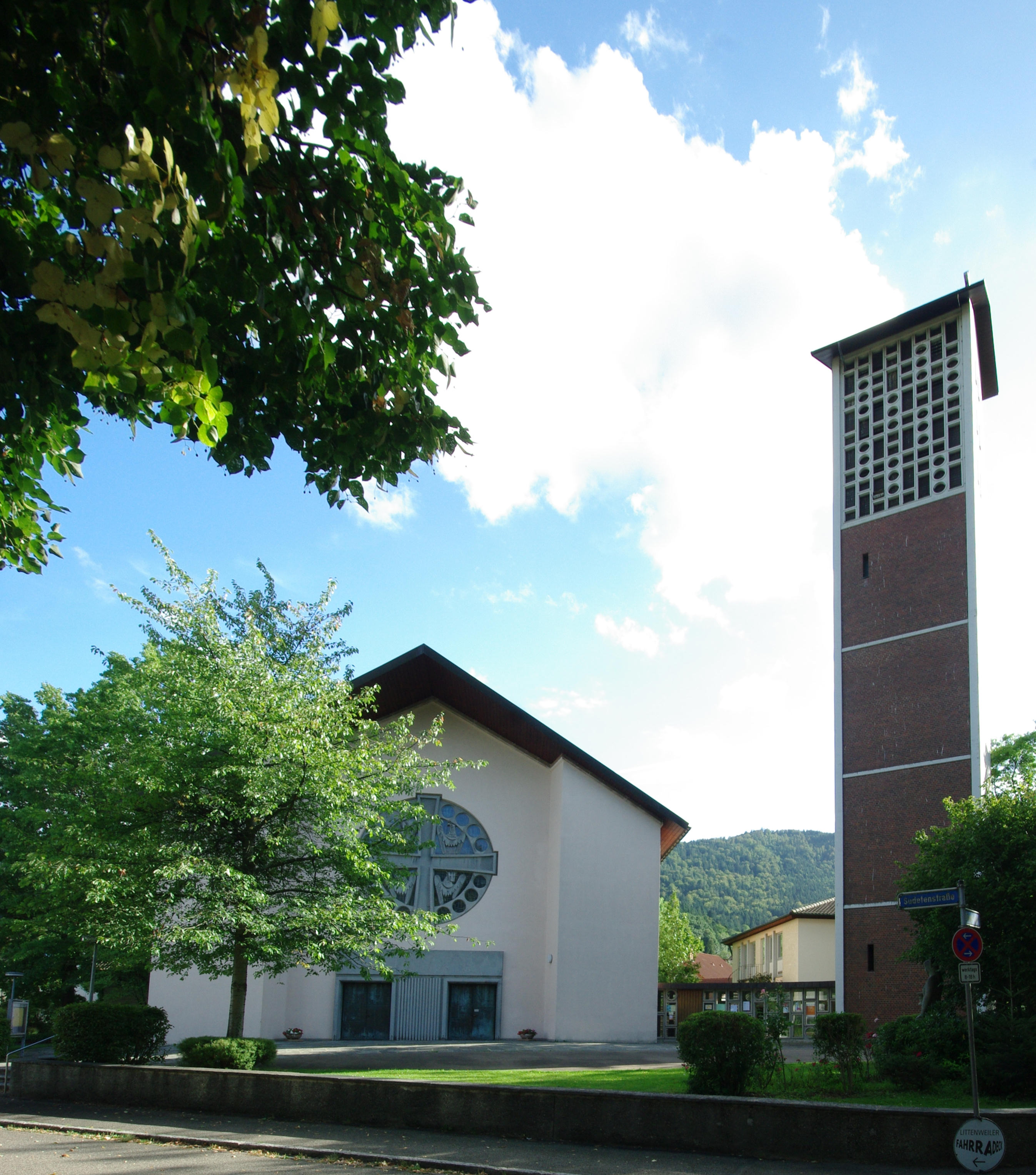 St,_Barbara